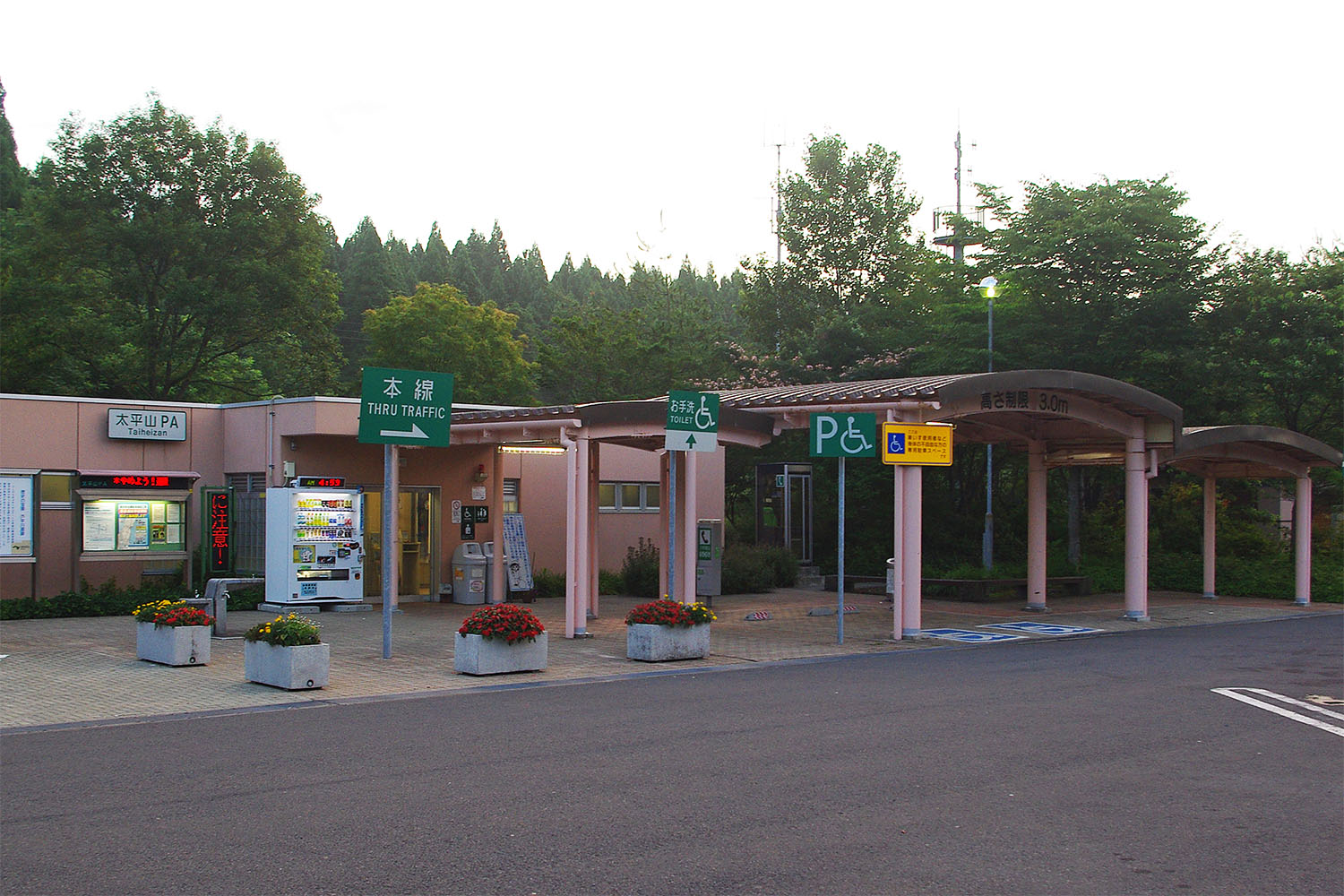 秋田自動車道太平山パーキングエリア上り線